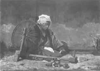 小泉成一《小春ノ日和》1888年